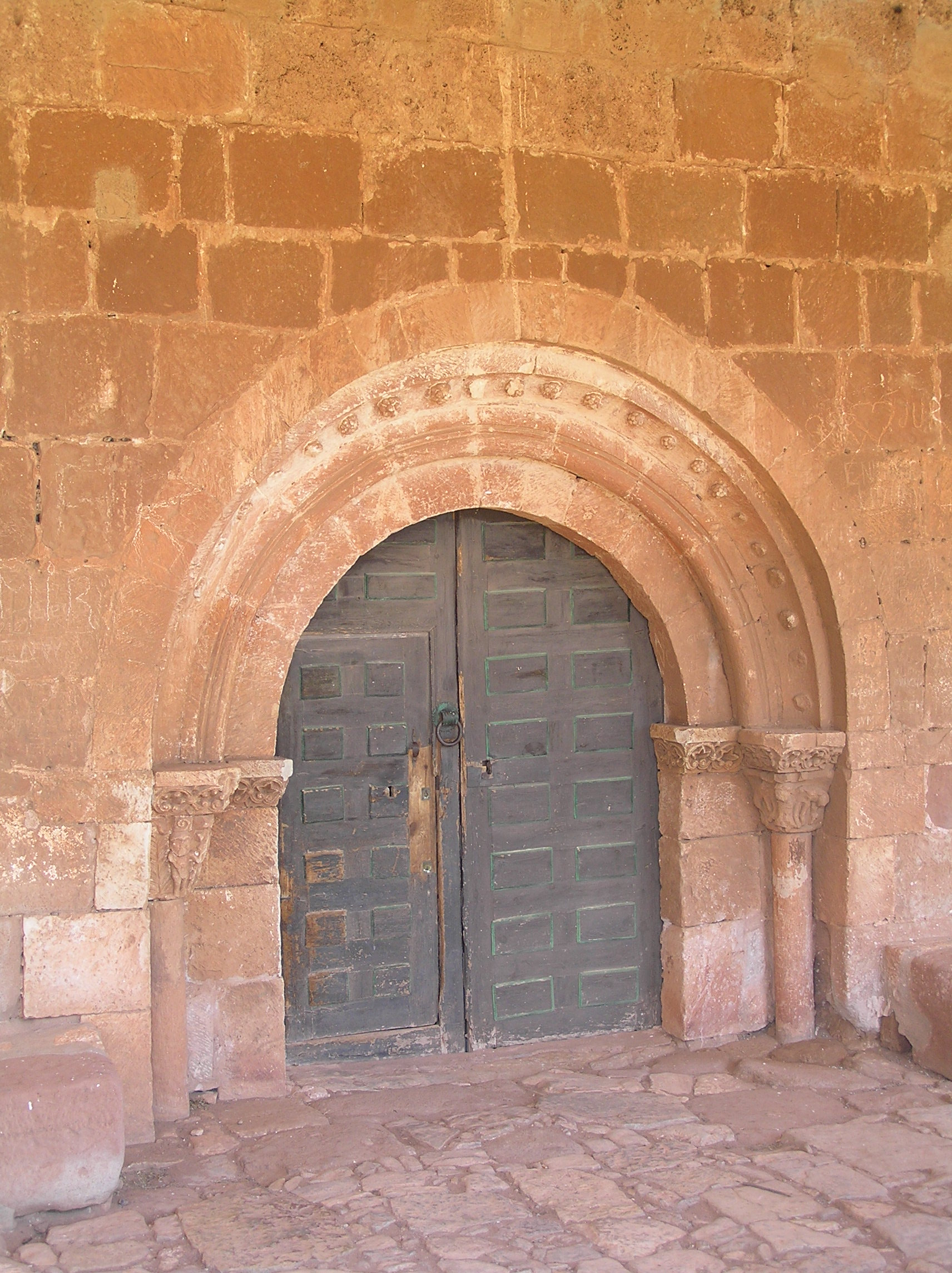 Puerta de la ermita de Nuestra Señora de Santa María, en Tiermes, Montejo de Tiermes (Soria)